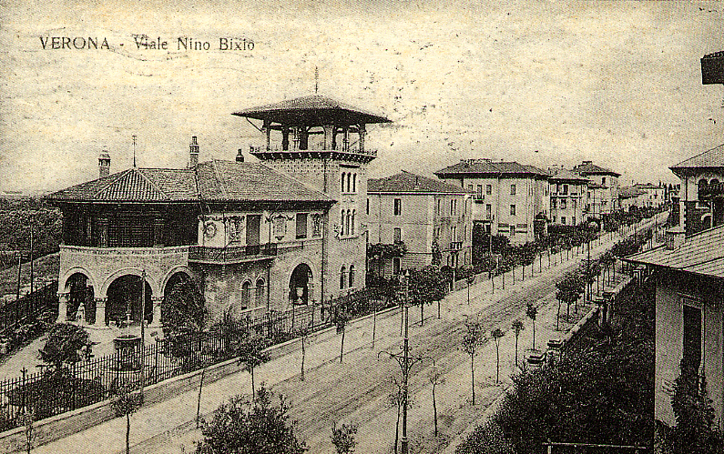 Via Nino Bixio a Verona in na fotografia del 1900 circa.